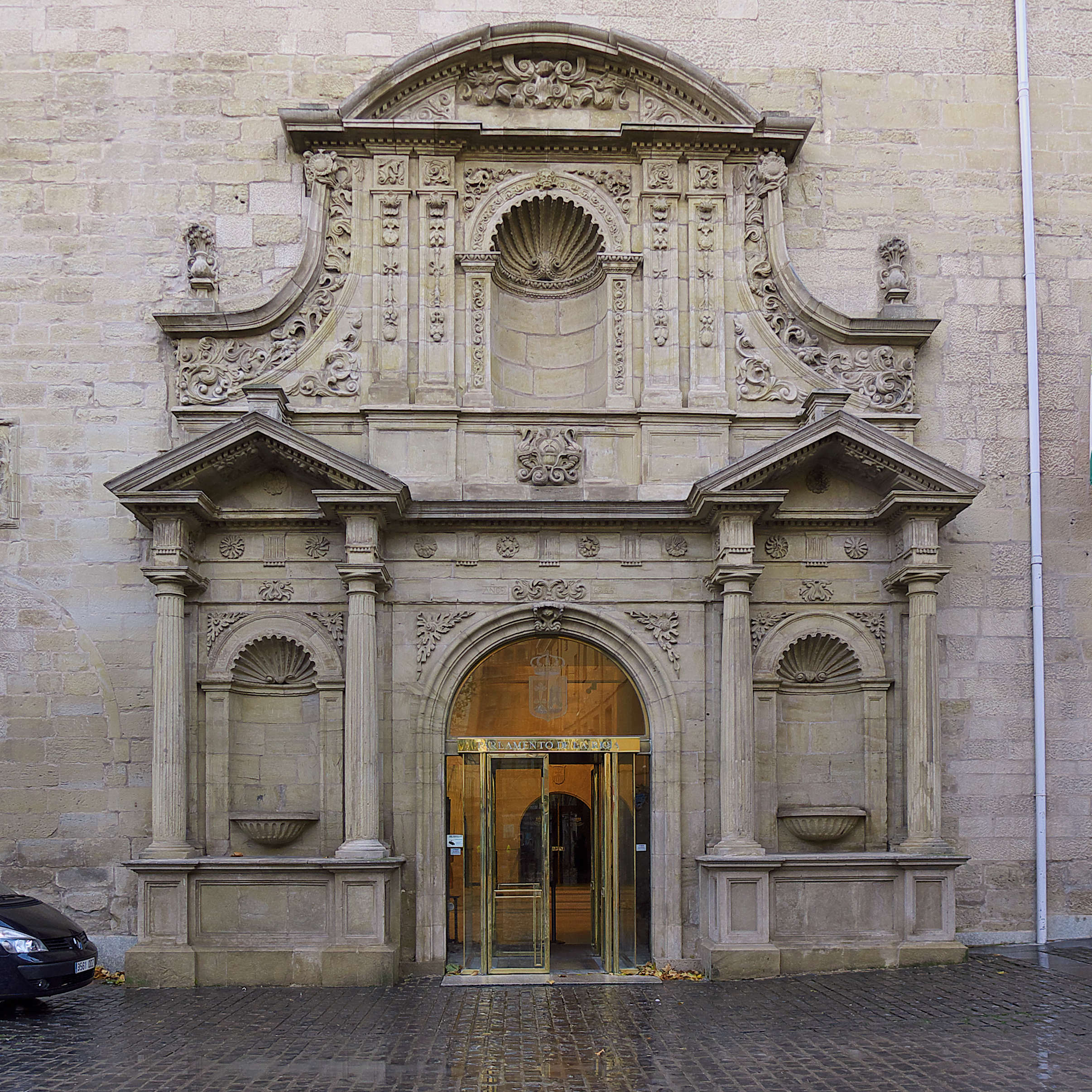 Antiguo convento de la Merced, Logroño. Portada barroca (1685)